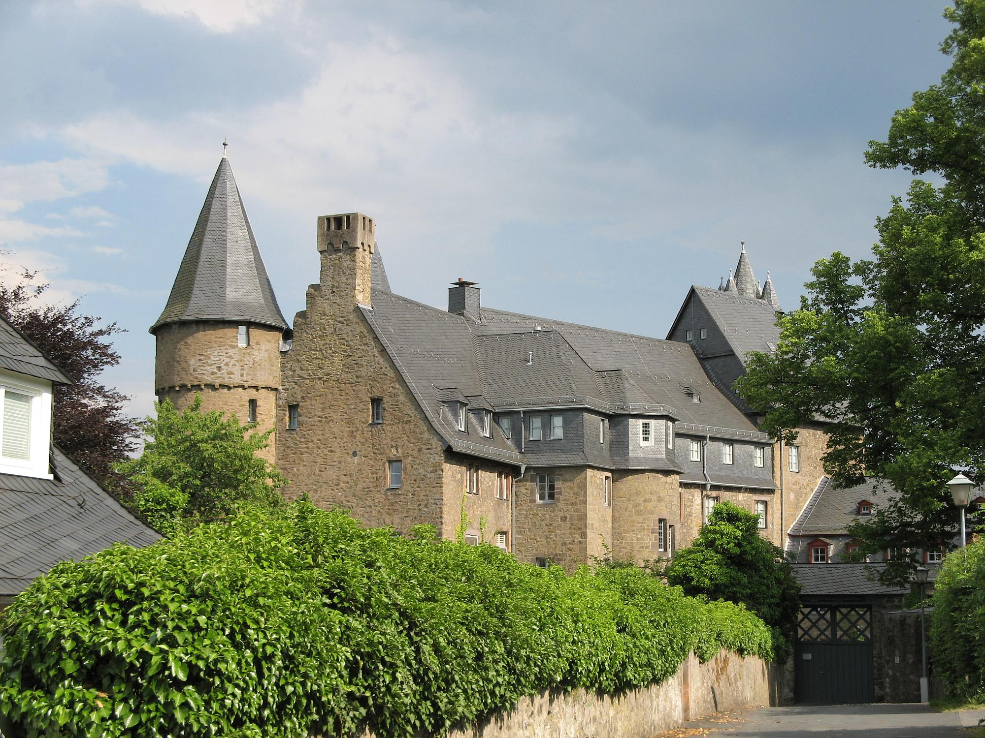 Die Rückseite des Schlosses Herborn